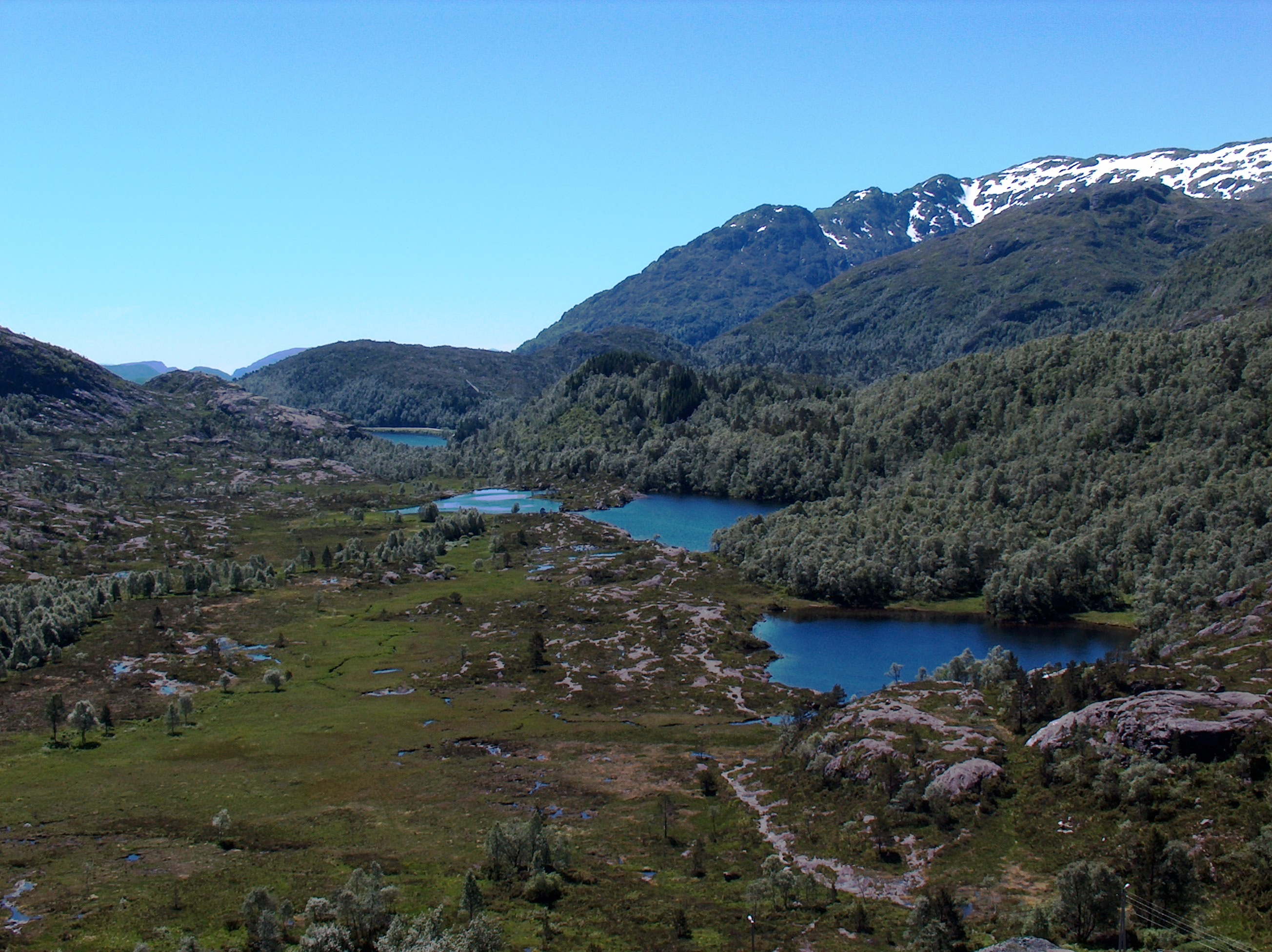 Kråmyrane naturreservat in Bergen in Norway. Photo: Svein Harkestad, Bergen in Norway